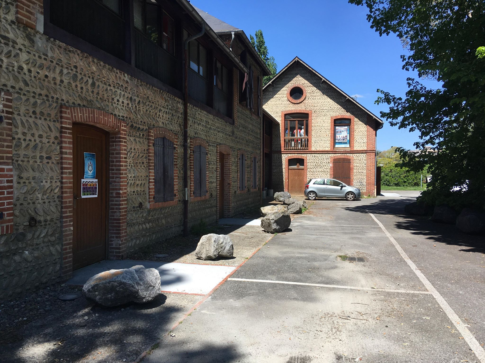 Façades de la maison des élèves et du foyer de l'ENIT.